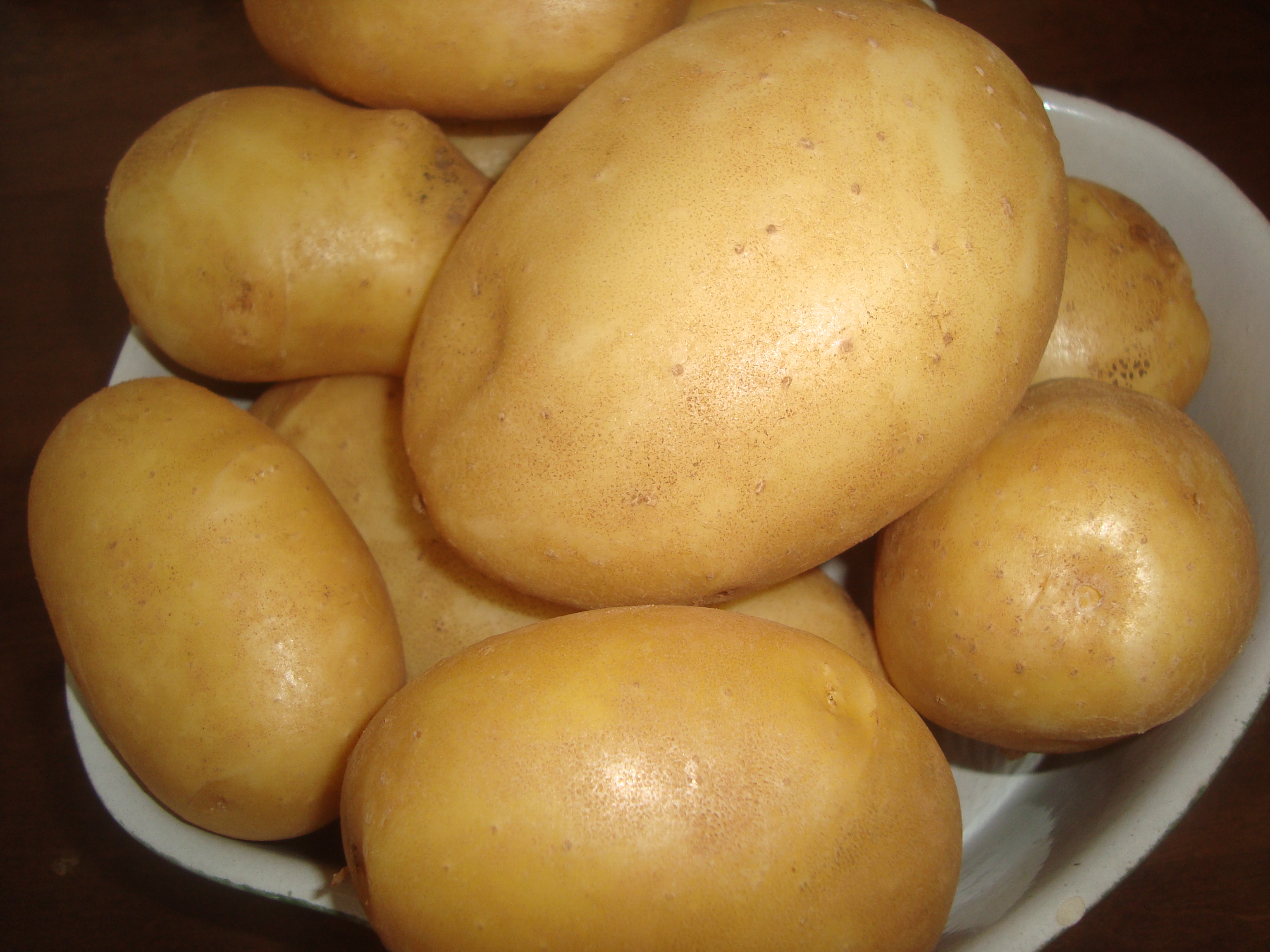 Patates de cultiu ecològic